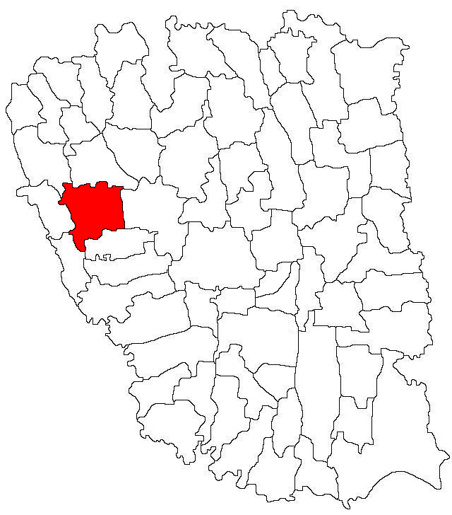 Categorie:Hărţi ale judeţului Galaţi